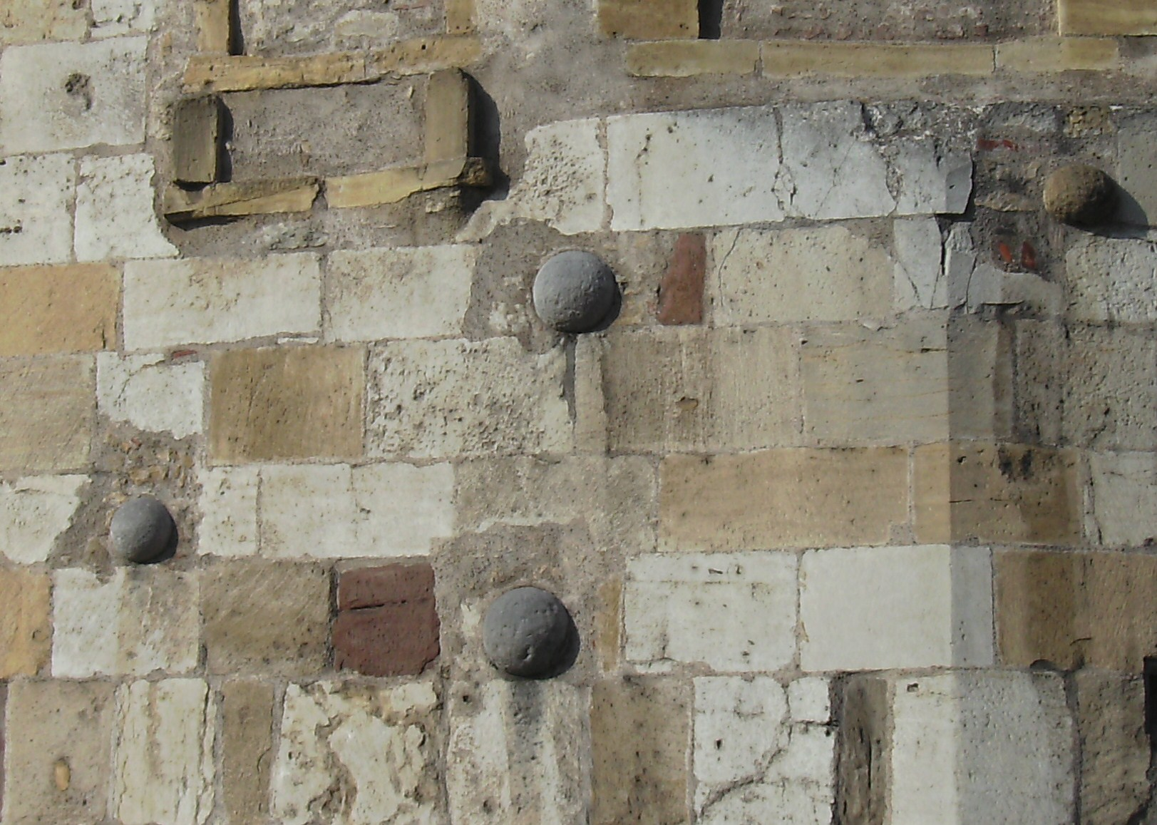 Thionville: Kanonenkugeln im Wehrturm neben dem Rathaus